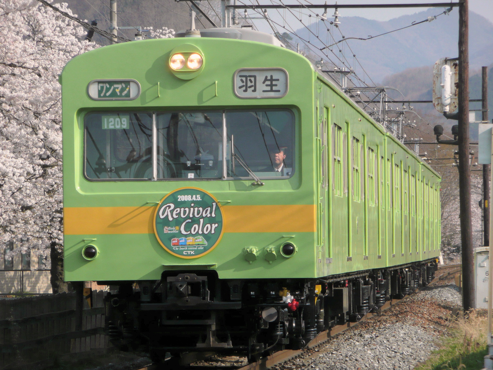 秩父鉄道1000形・リバイバルカラー(関西線色)